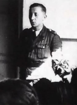 Belarusian politican Mihas Gancko